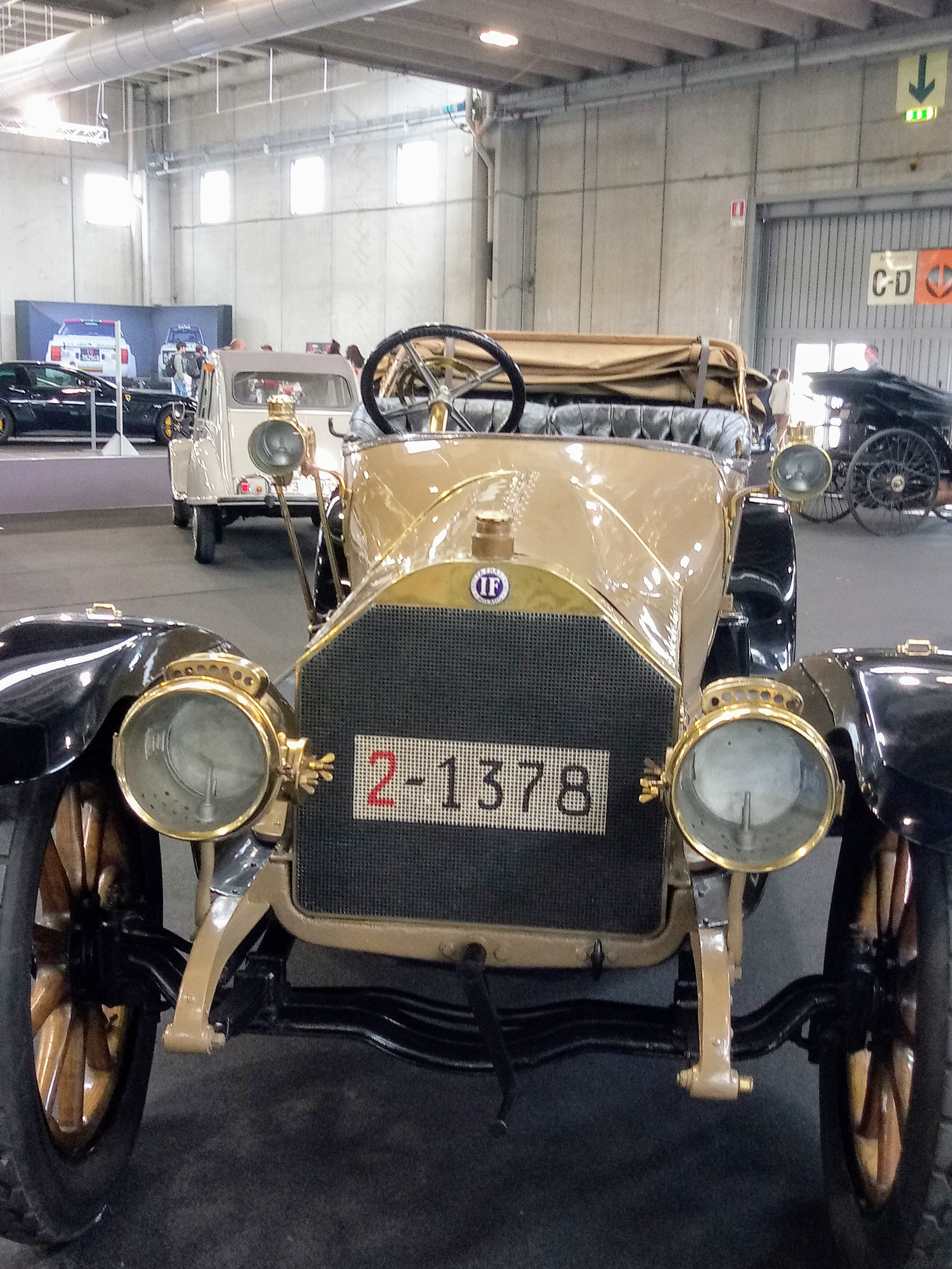 La foto rappresenta un raro esemplare di Isotta Fraschini Tipo TM/TC prodotto dal 1912 al 1914 e in esposizione nel padiglione 9 della fiera "Verona Legend Cars" i giorni 11 e 12 maggio 2019. Di notevole interesse la targa anteriore con la sigla provinciale espressa dal numero 2 rosso e posizionata sul radiatore. Giorno in cui la foto è stata scattata: 11/05/2019.